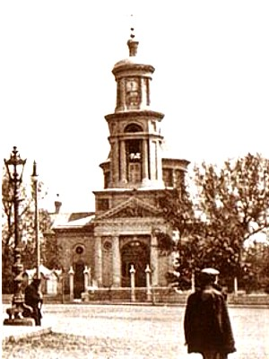 Нахичевань-на-Дону. Церковь Григория Просветителя